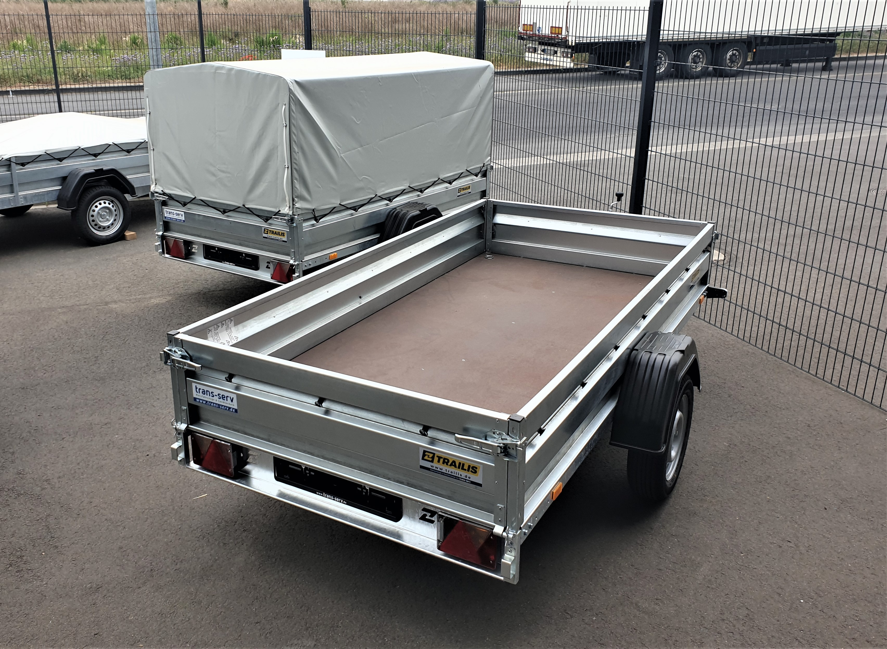 Moderne Anhänger für den Einsatz an Pkw in der EU, mit und ohne Planenverdeck.